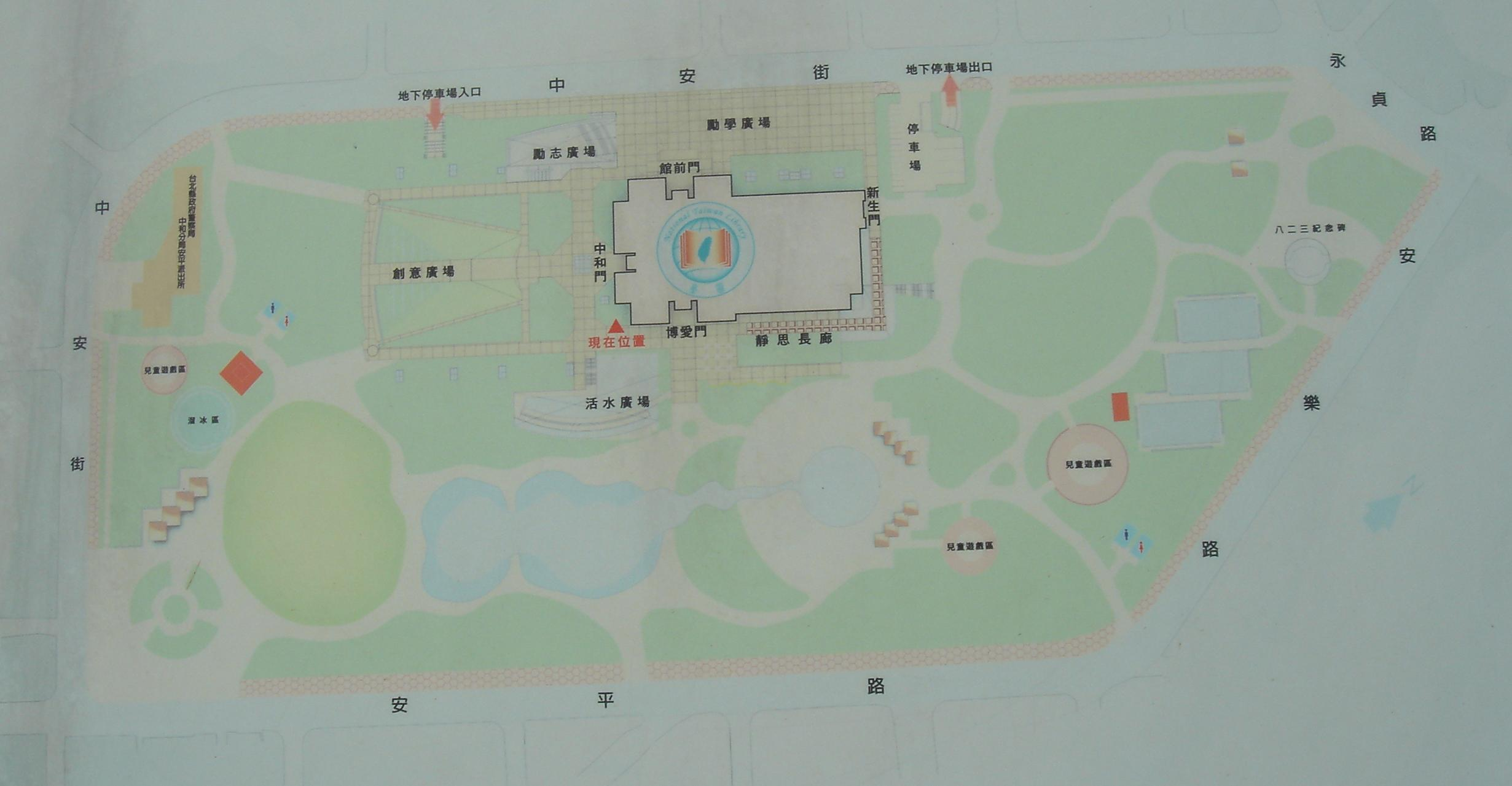 台北縣中和市四號公園設施配置圖